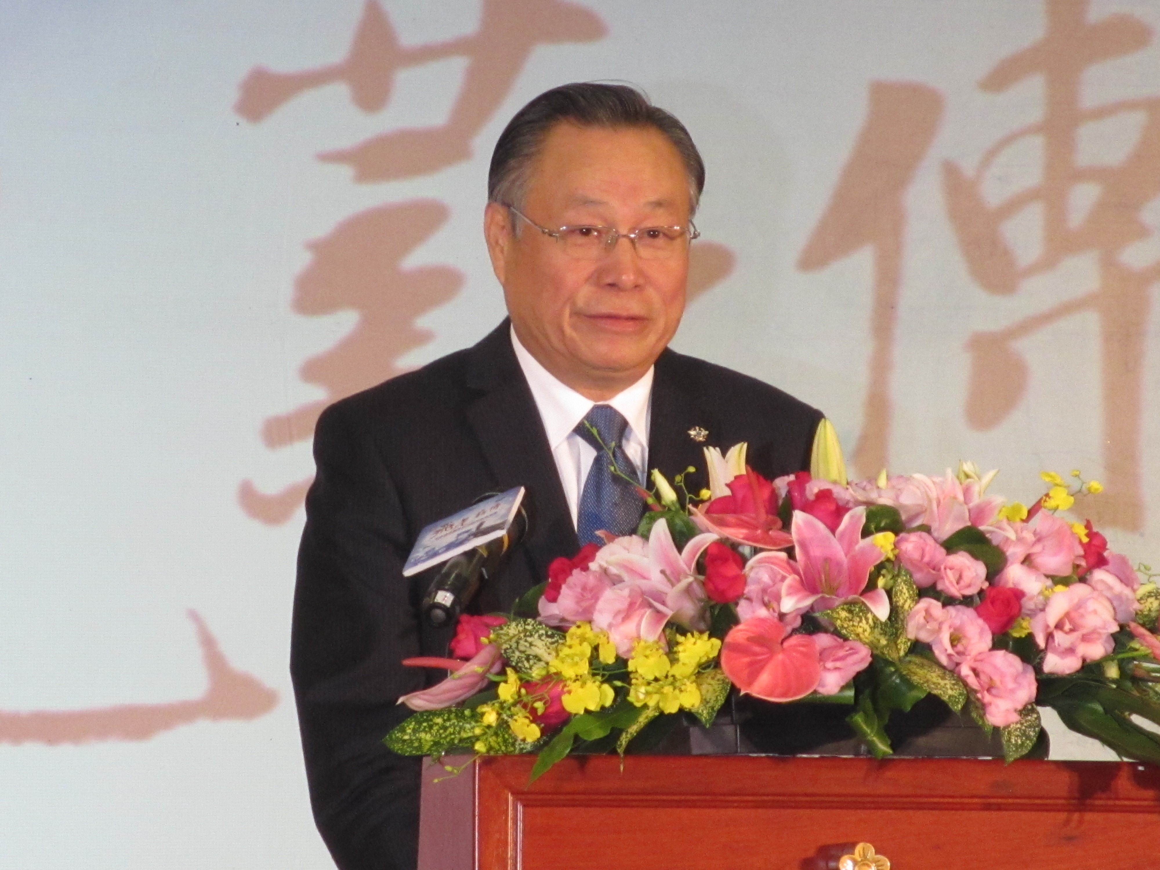 Yen Ming 嚴明